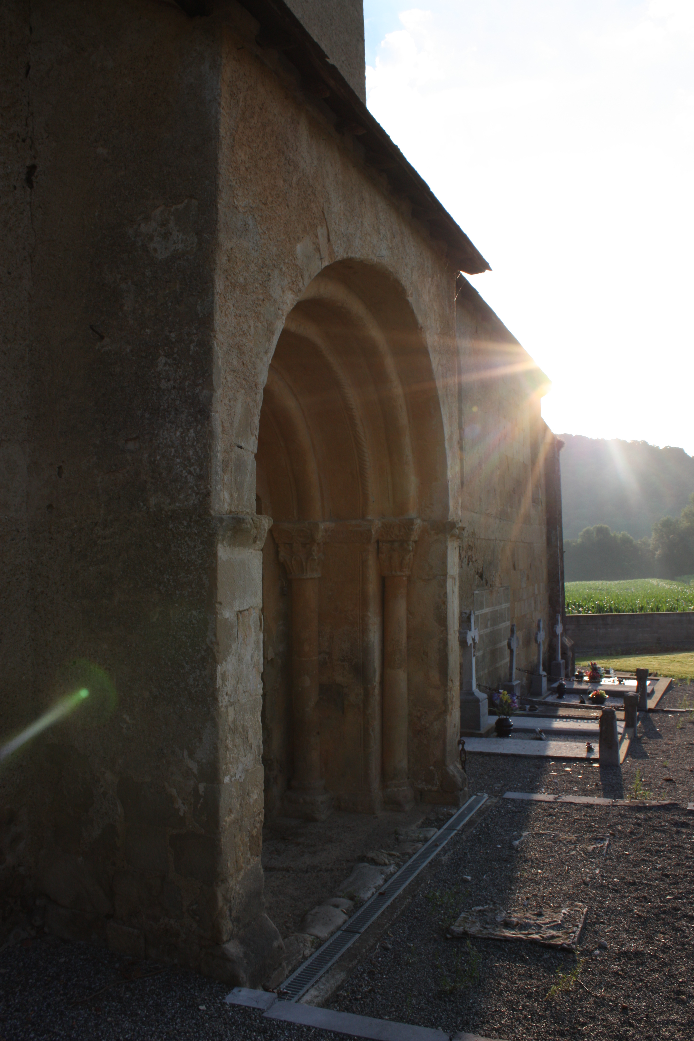 Eglise de Lannecaube, Pyrénées Atlantiques